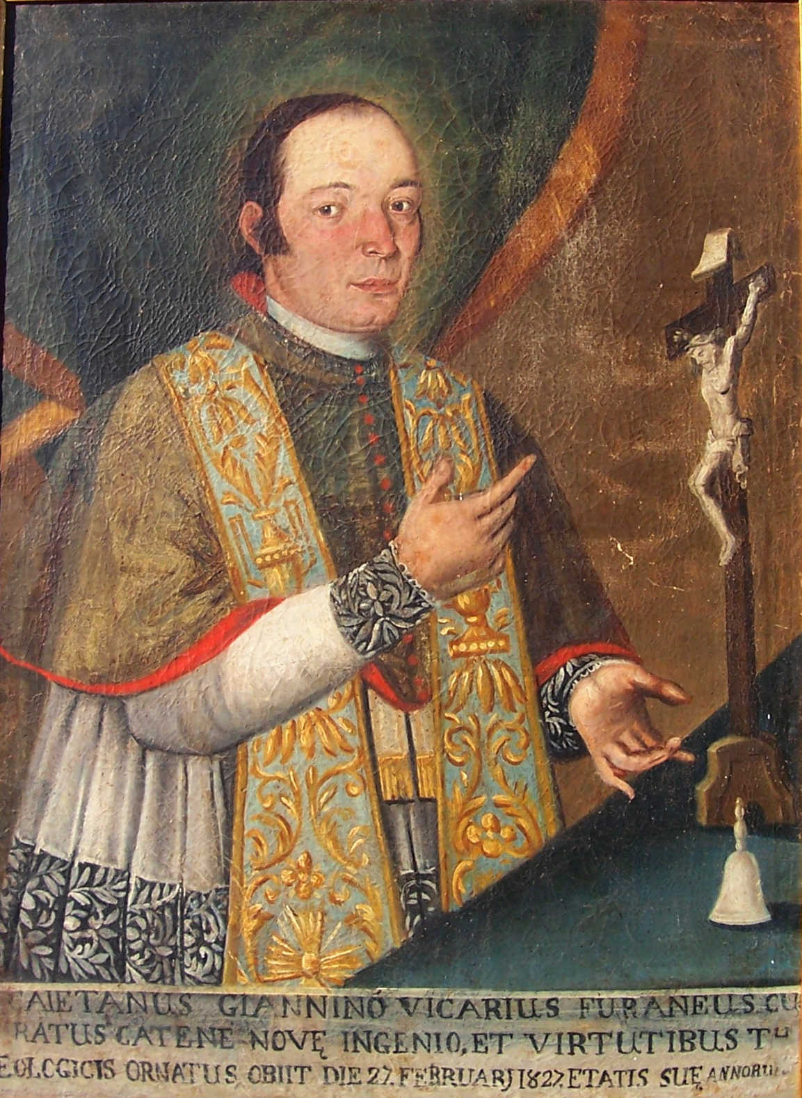 Ritratto di Don. Gaetano Gianninò - 1827